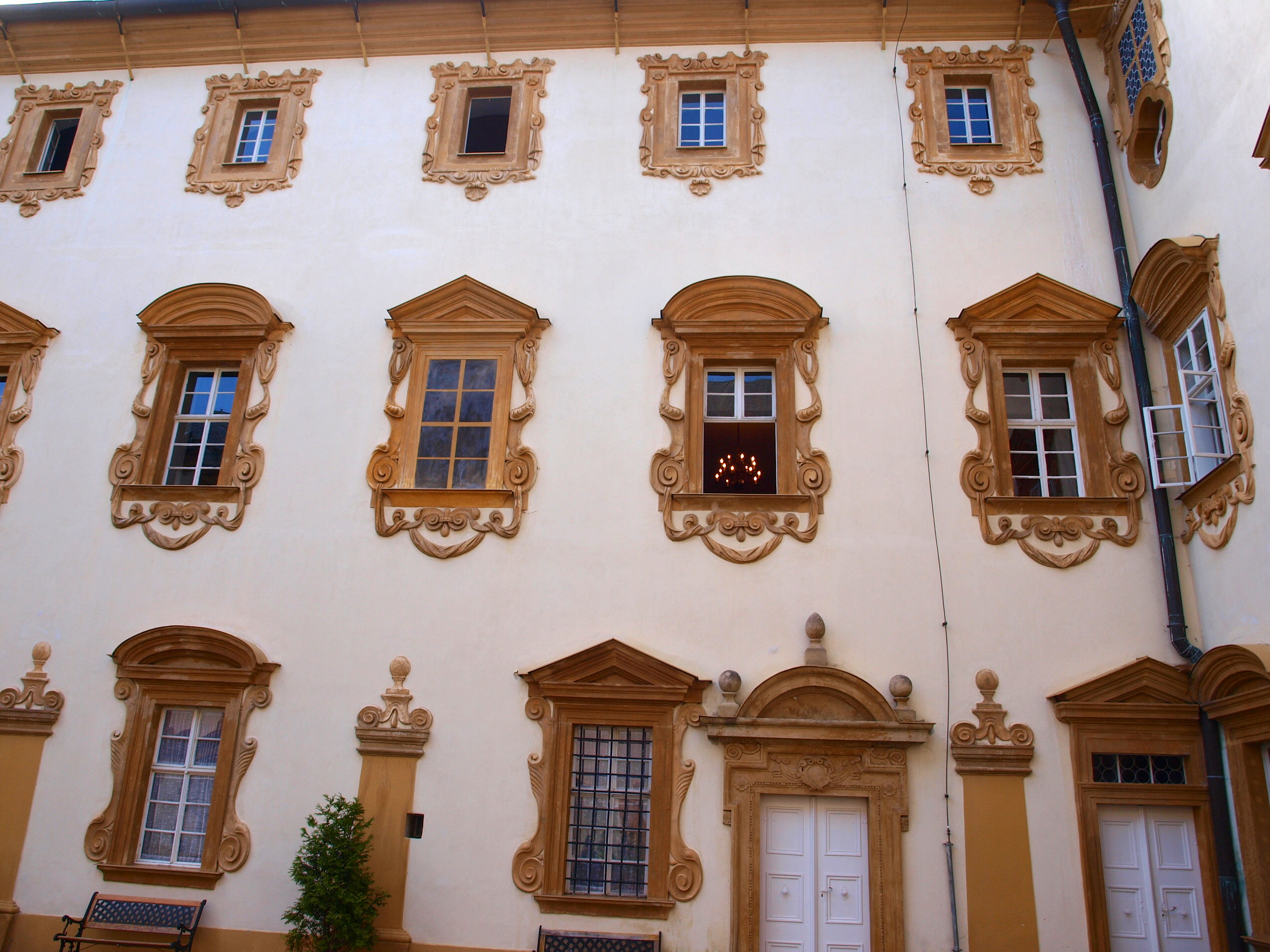 Zámek Lemberk